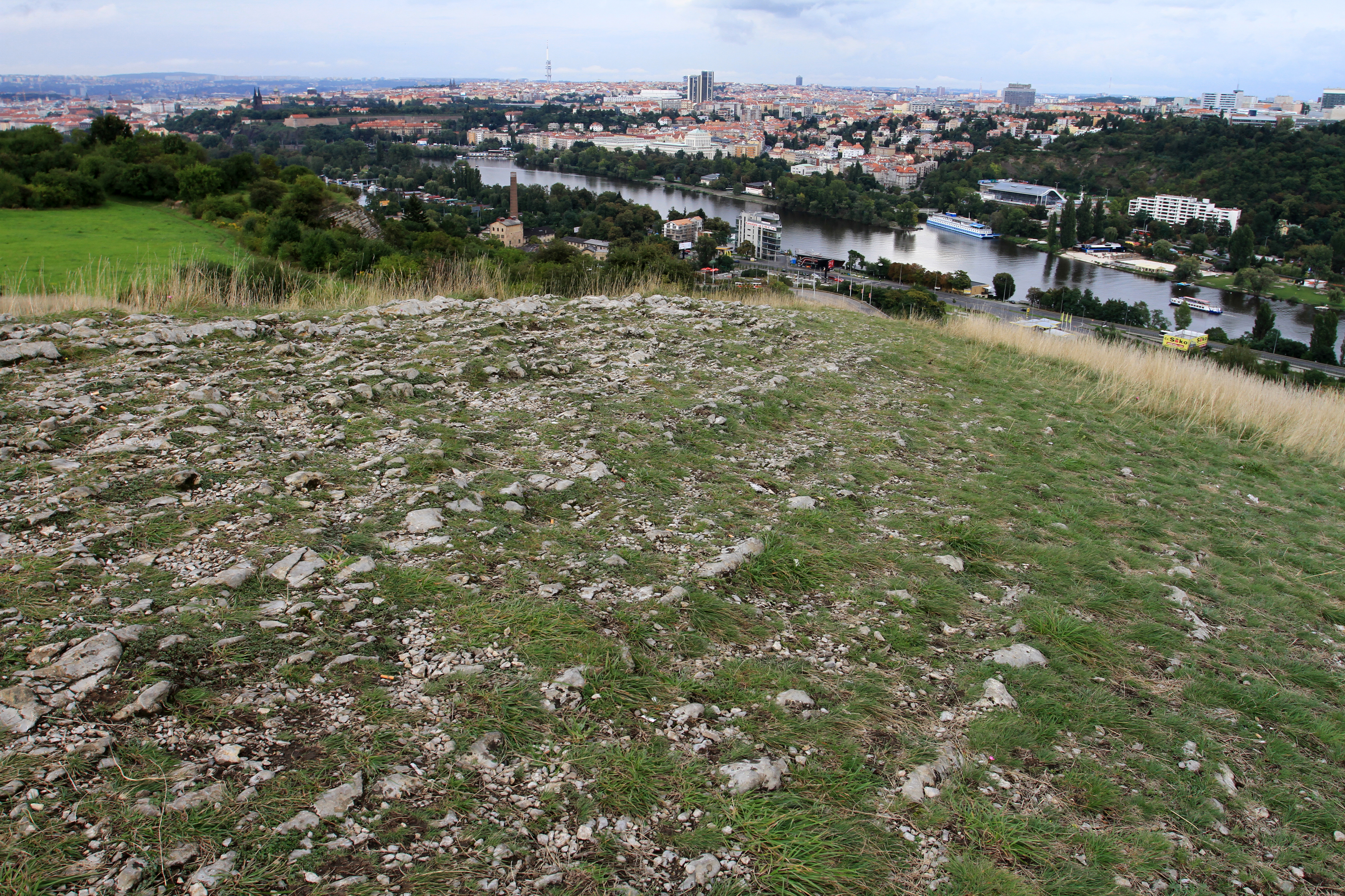 Hradiště Dívčí hrady, Praha 5, Hlubočepy, Radlice, Smíchov